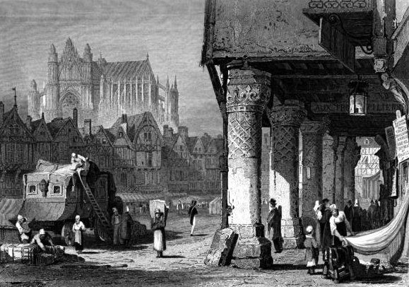 Beauvais